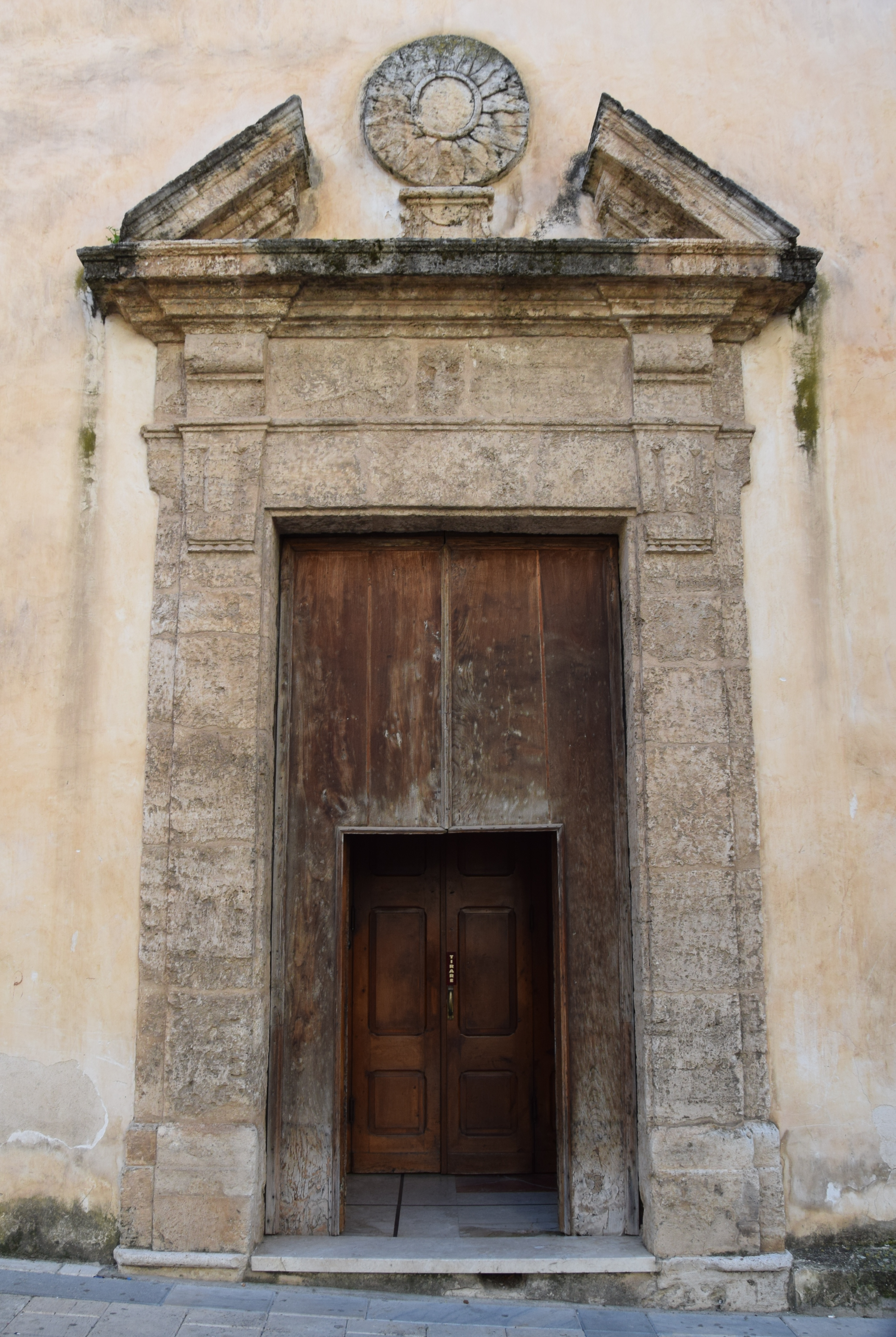 Chiesa del Collegio dei Gesuiti (Alcamo)